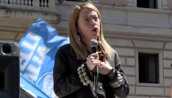 Giorgia Meloni mentre parla da un palco